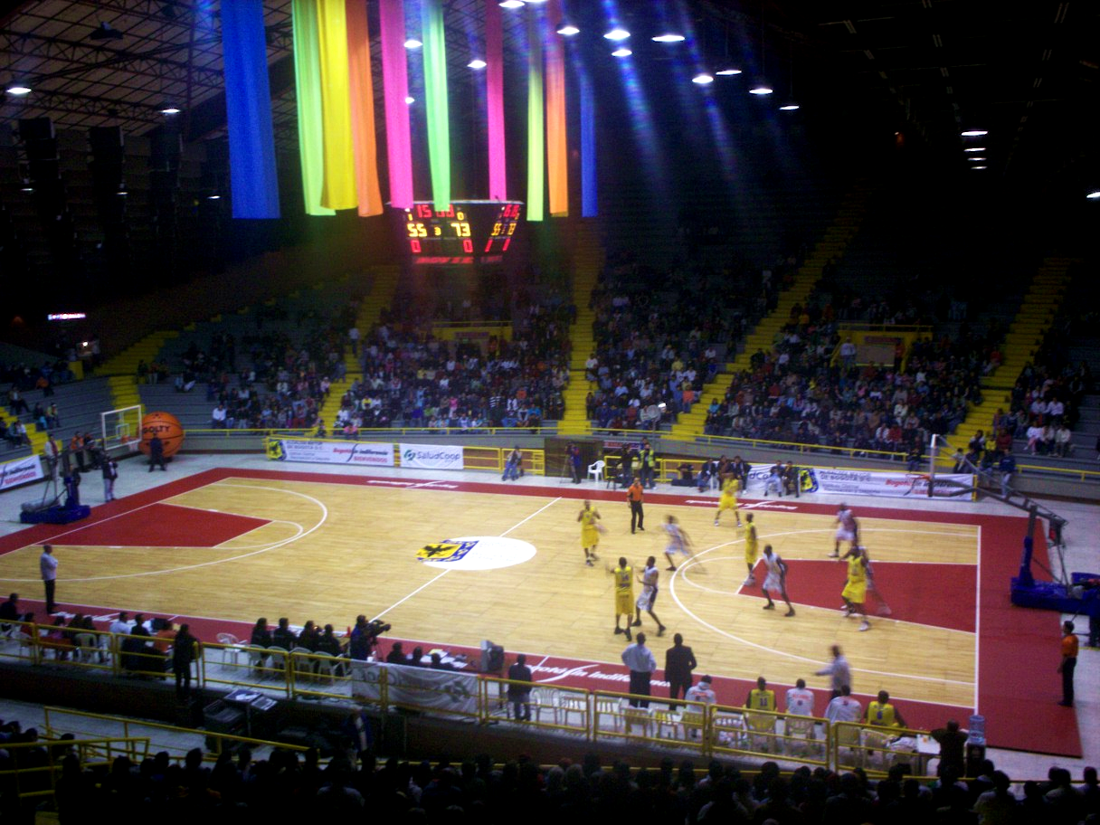 Partido de baloncesto en Colombia: Piratas Bogotá vs. Bucaros Santander en el Coliseo El Salitre de Bogotá.